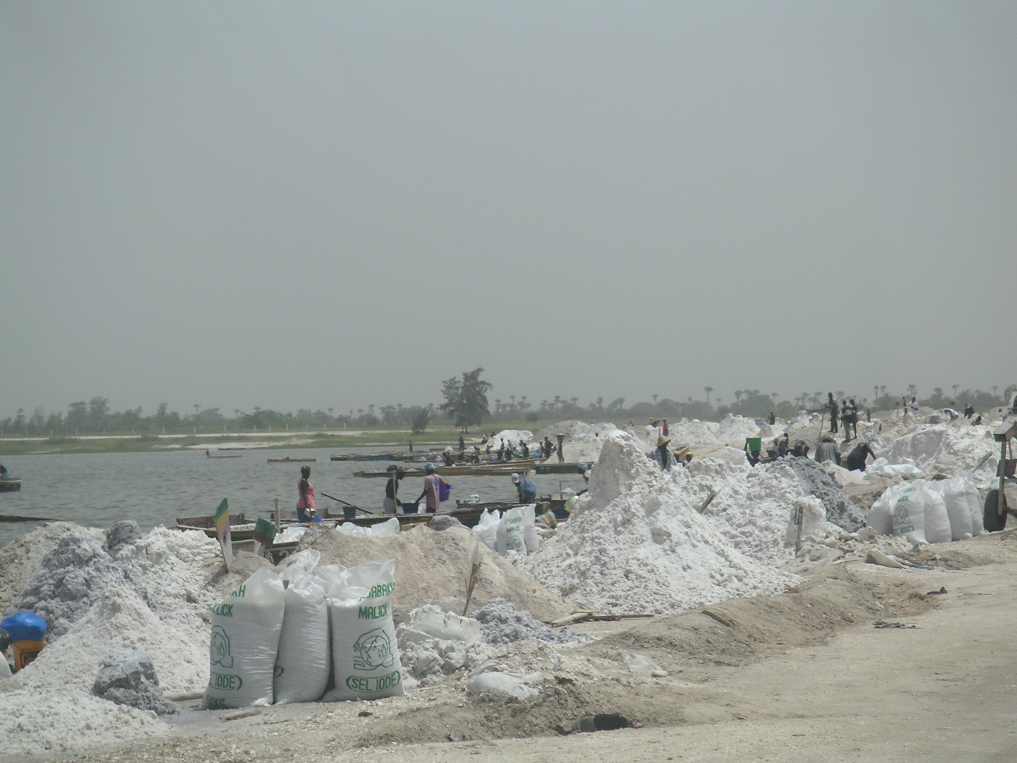 Récolte du sel au lac Rose (Sénégal)